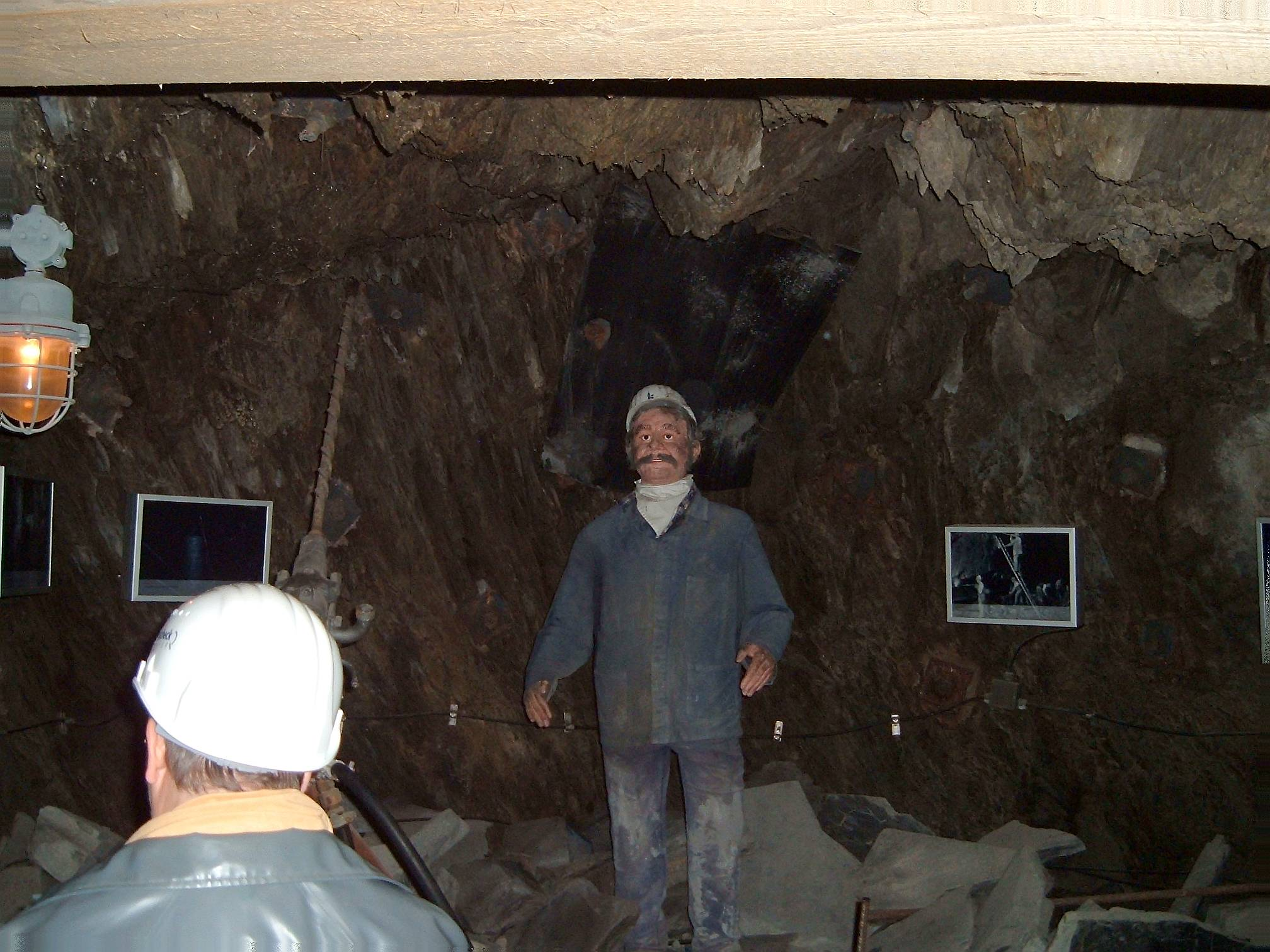 Bergbaumuseum in bzw. unterhalb der Genovevaburg